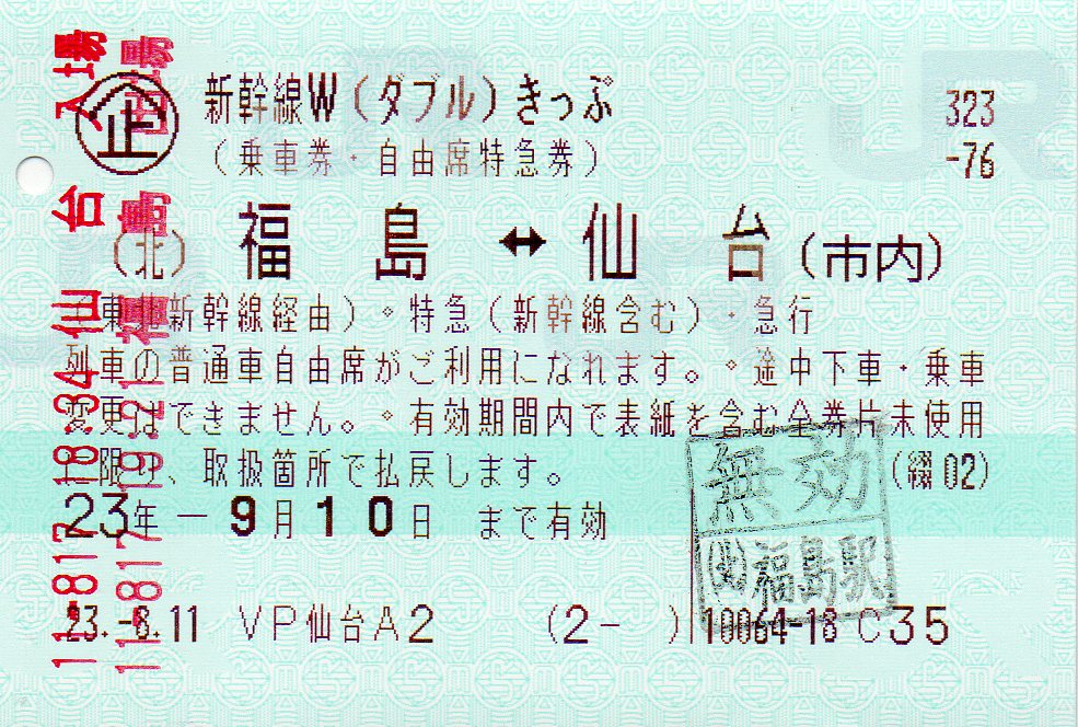 新幹線Wきっぷ福島～仙台 2011年8月17日使用